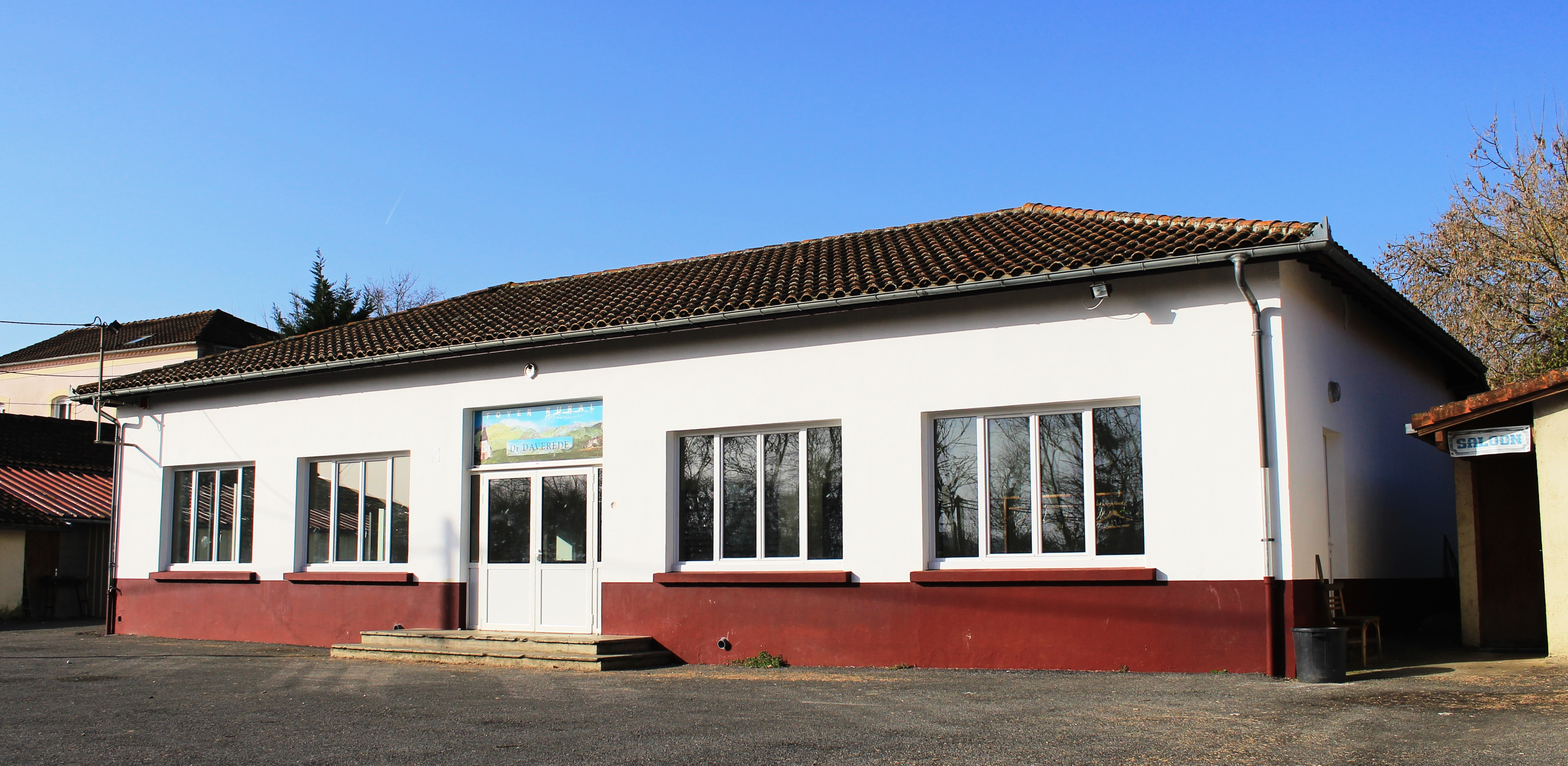 Foyer rural de Marseillan (Hautes-Pyrénées)